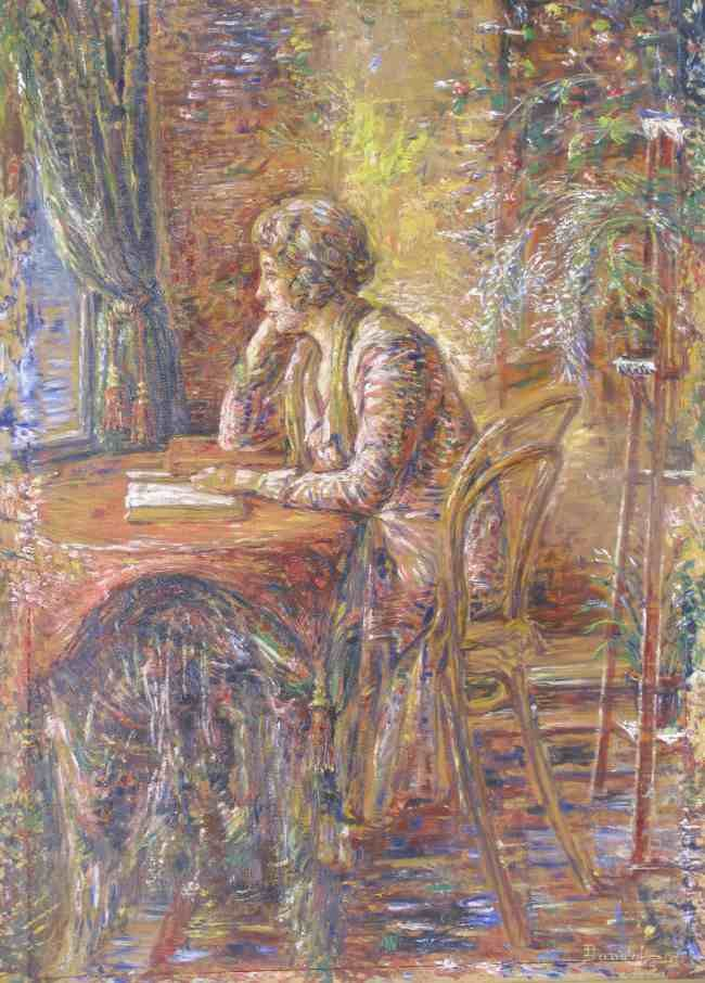 Драган Данаилов (1873 - 1948) - „Мечтание“, маслени бои, дъска , 50.5/71.5, подписано